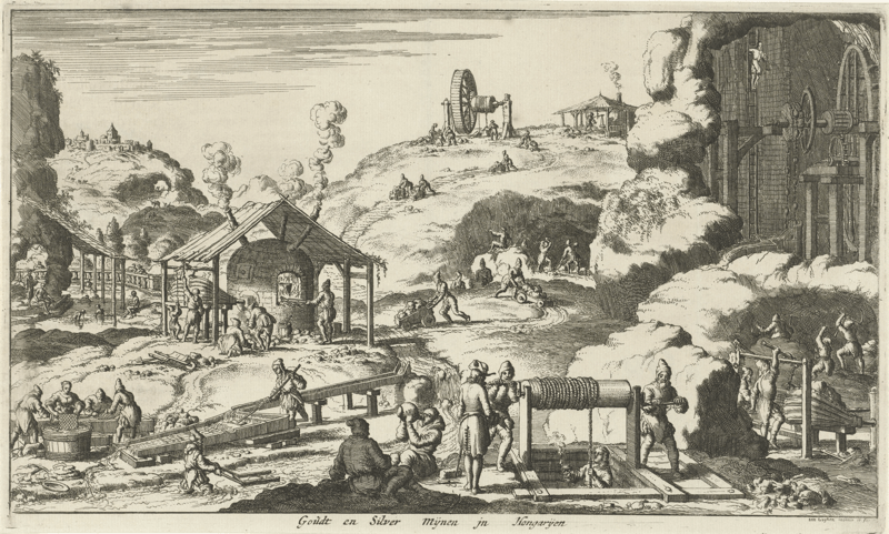 Arany- és ezüstbányászat Magyarországon